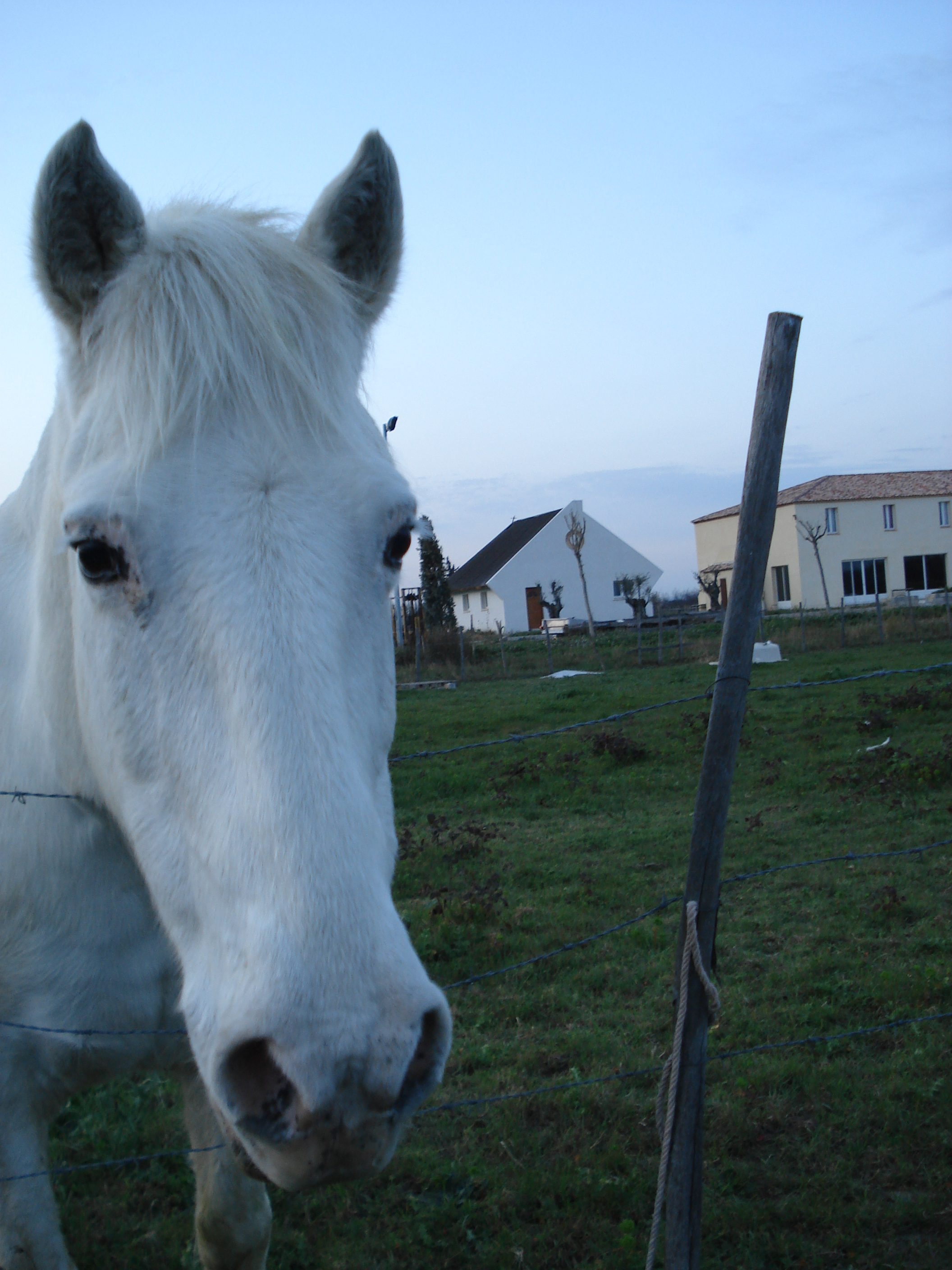 Cheval Camarguais dans son milieu naturel Auteur : R. BENEZET Date :12 Mars 2007